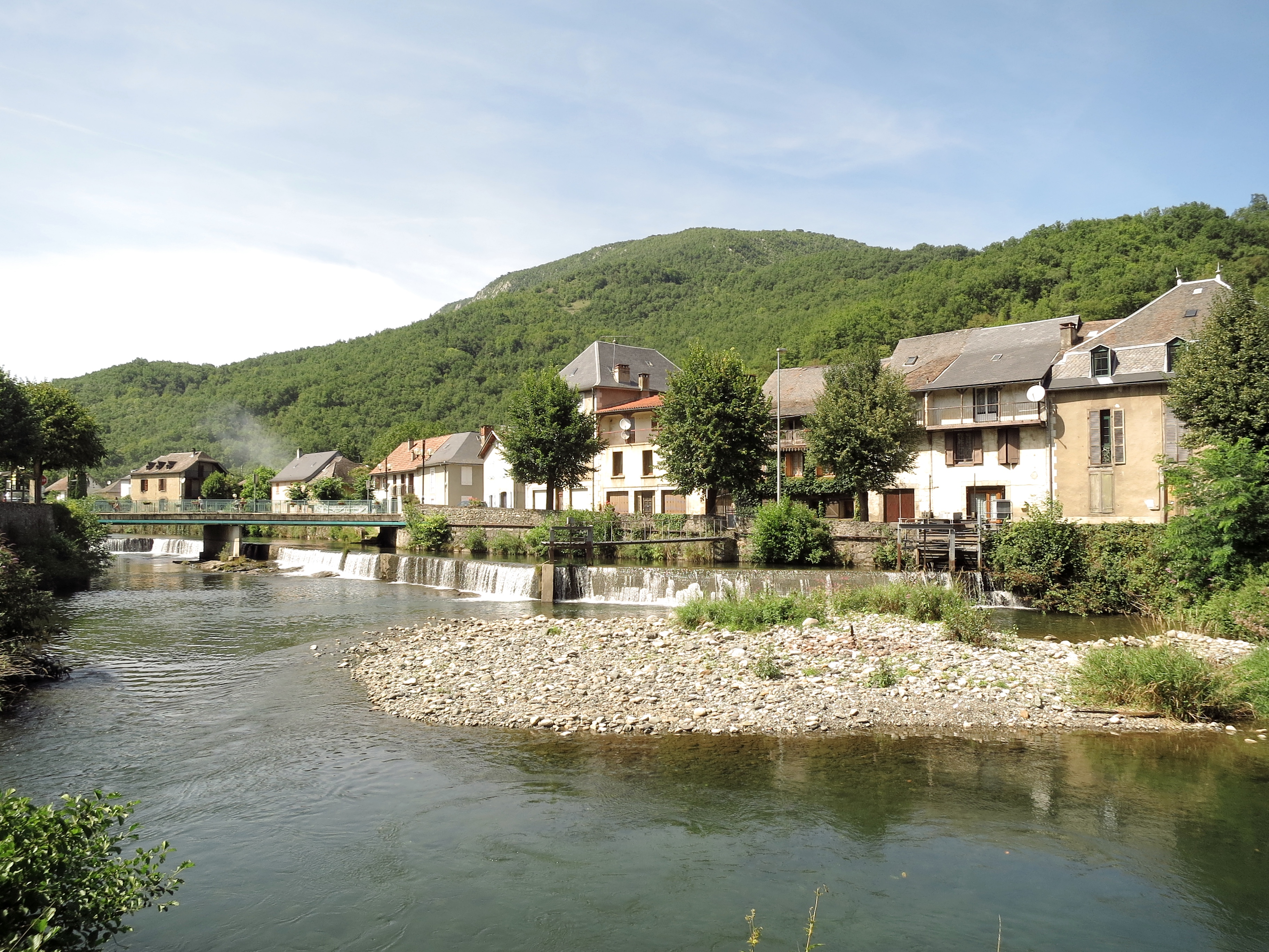 Engomer (Ariège, Midi-Pyrénées, France) - Le village vu depuis la rive droite du Lez.